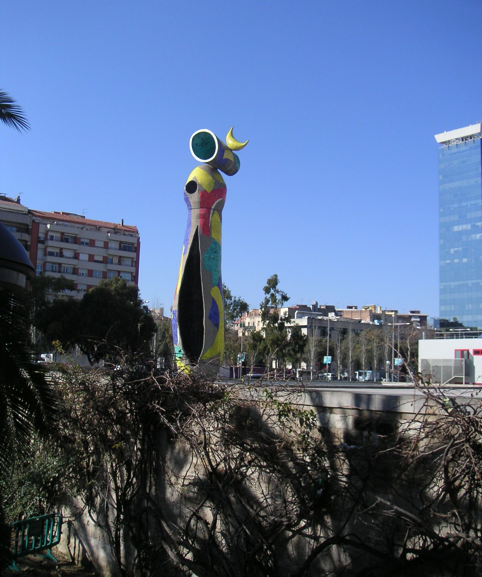 Parc Joan Miró (antic Parc de l'Escorxador) a l'Eixample esquerra de Barcelona. Vista cap a Tibidabo. L'escultura "Dona i Ocell", de Joan Miró, es troba en aquest parc.